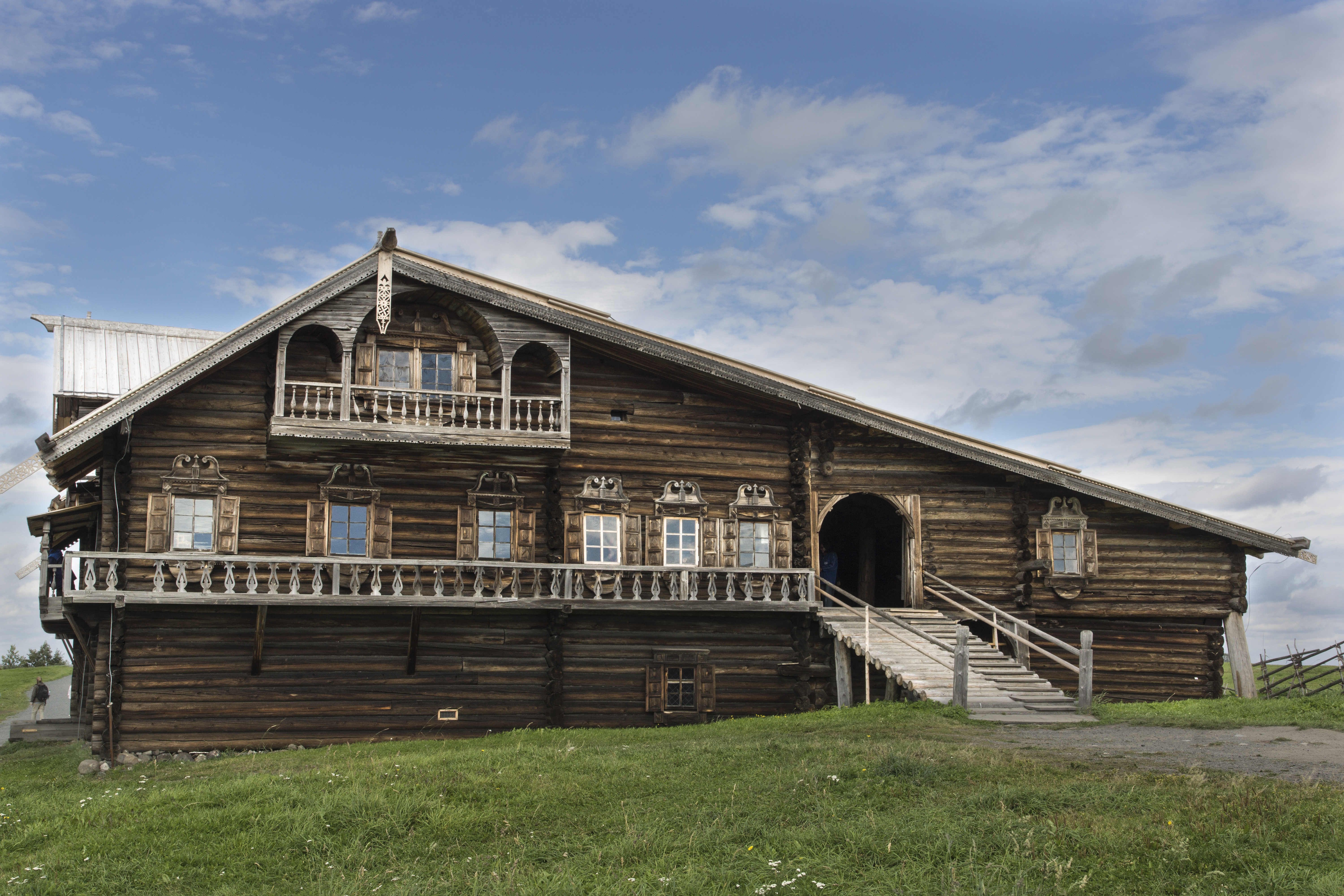 Музей-заповедник деревянного зодчества "Кижи"